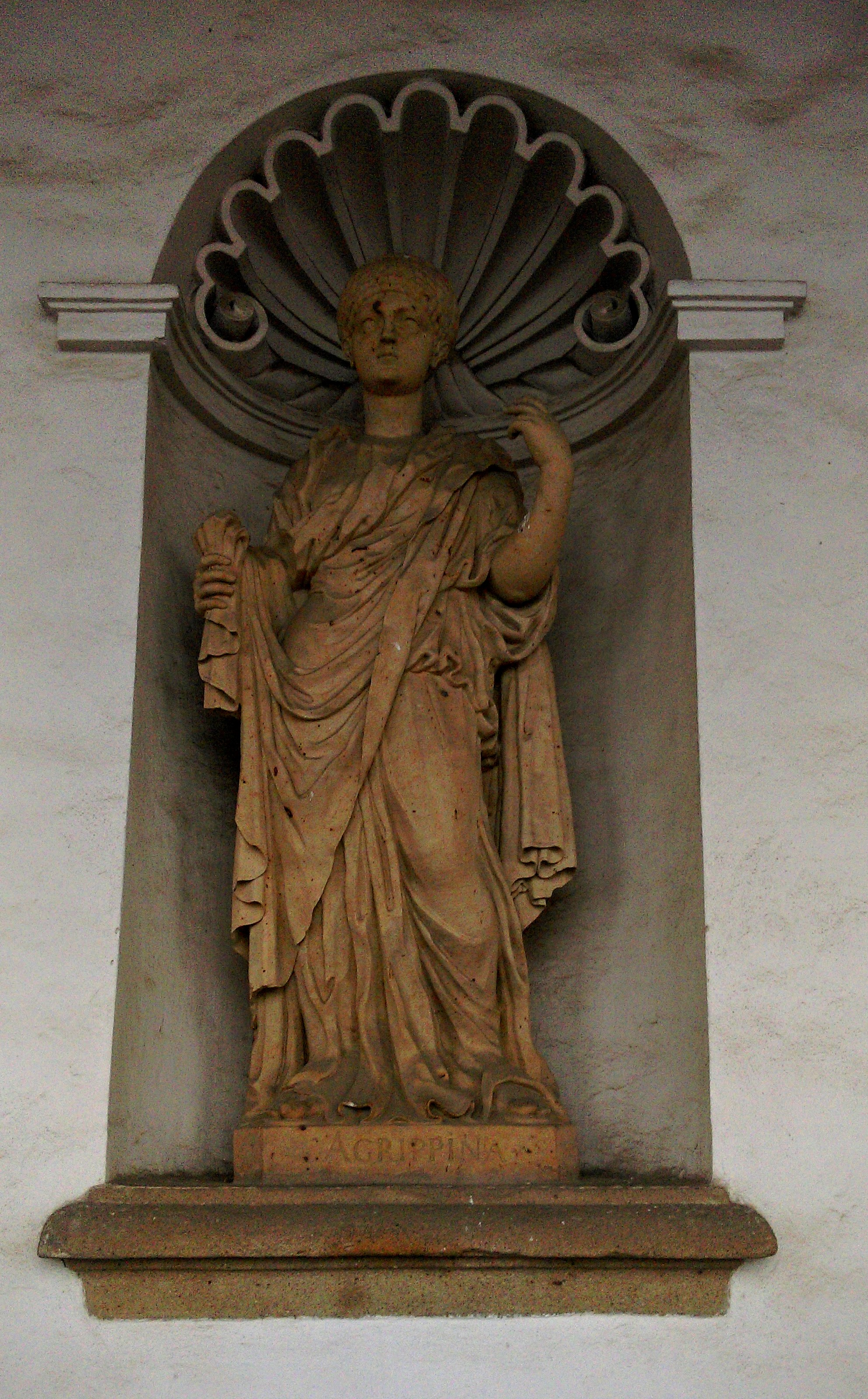 Agrippina - socha v kolonádě v Květné zahradě v Kroměříži